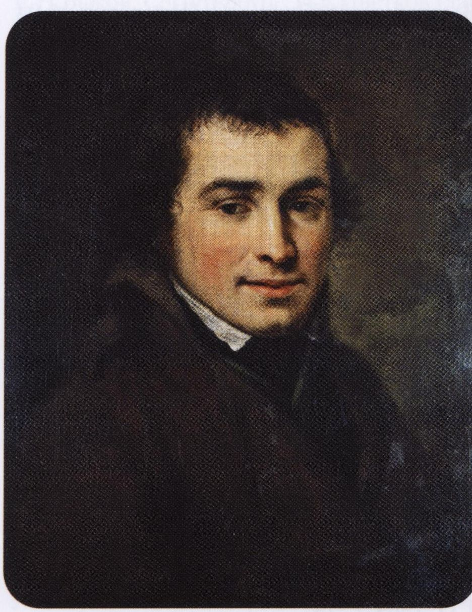 Портрет А.В. Ступина. 1804